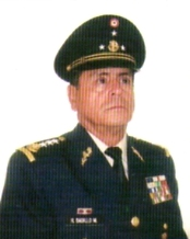 General Roberto Badillo Martínez.